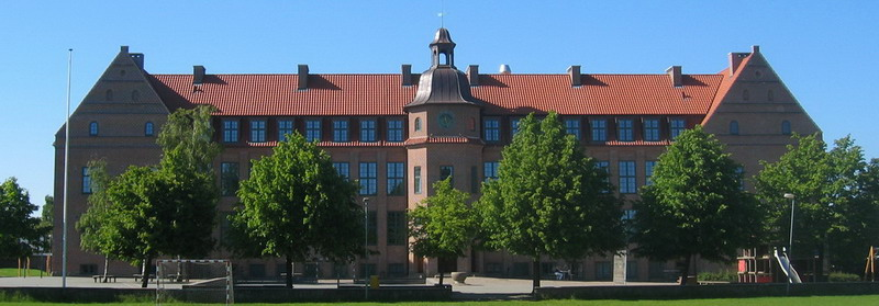 Billede af Risskov Skoles hovedbygning - juni 2006